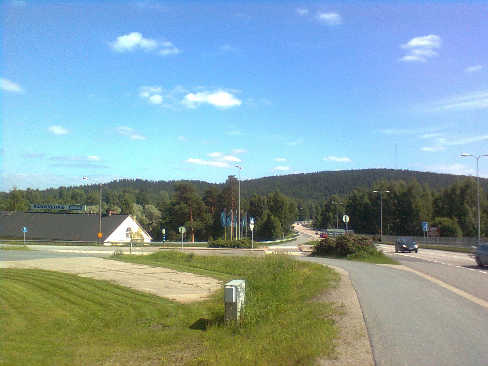 Jyväskylän Kanavuori Vaajakosken suunnasta kuvattuna.